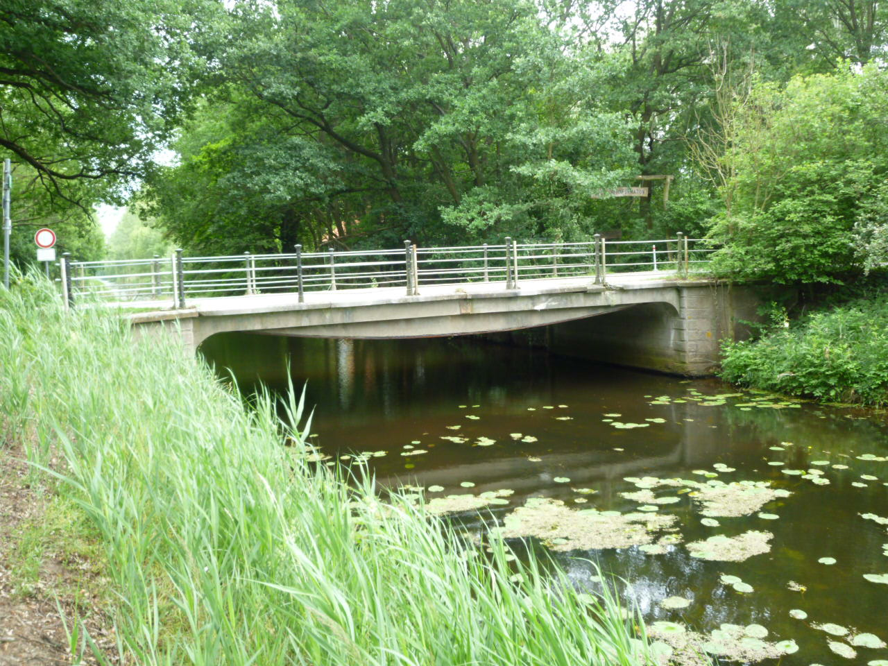 Die Calvörder Möllerbrücke über die Ohre in Kämkerhorst